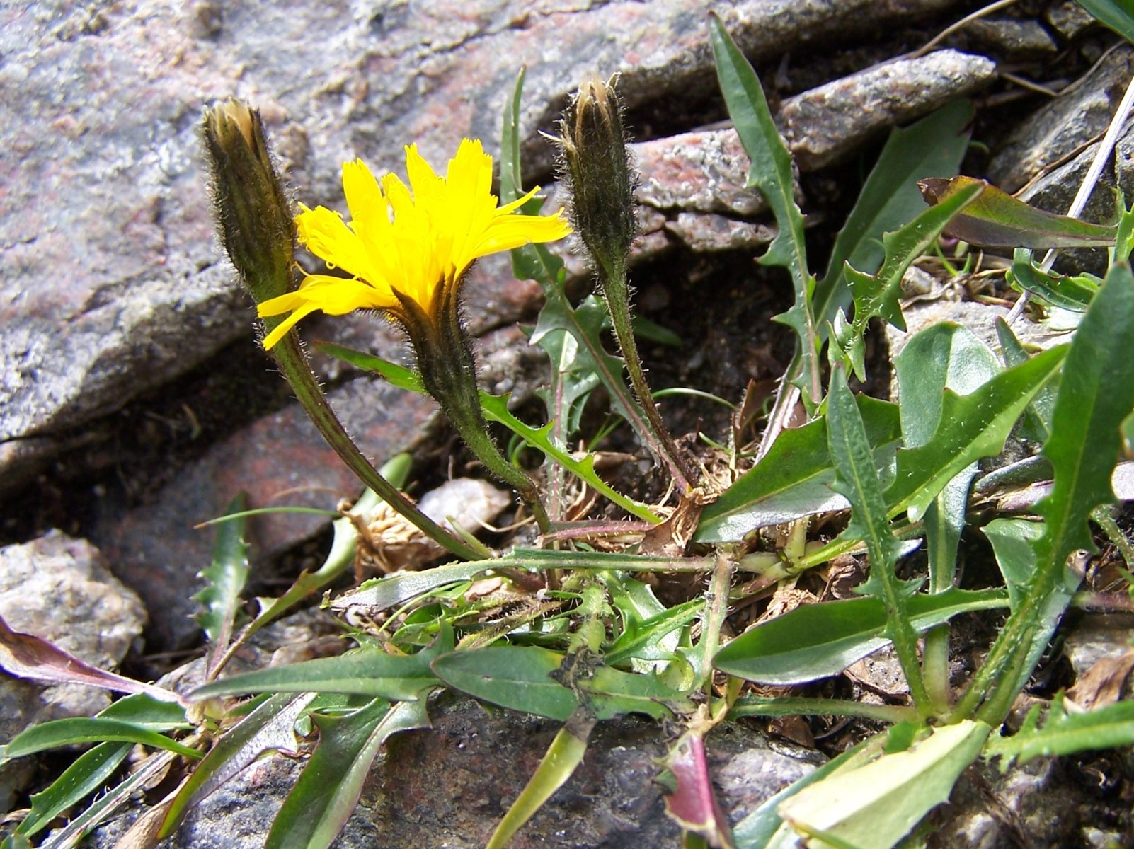 Leontodon pseudotaraxaci (pl. brodawnik tatrzański)